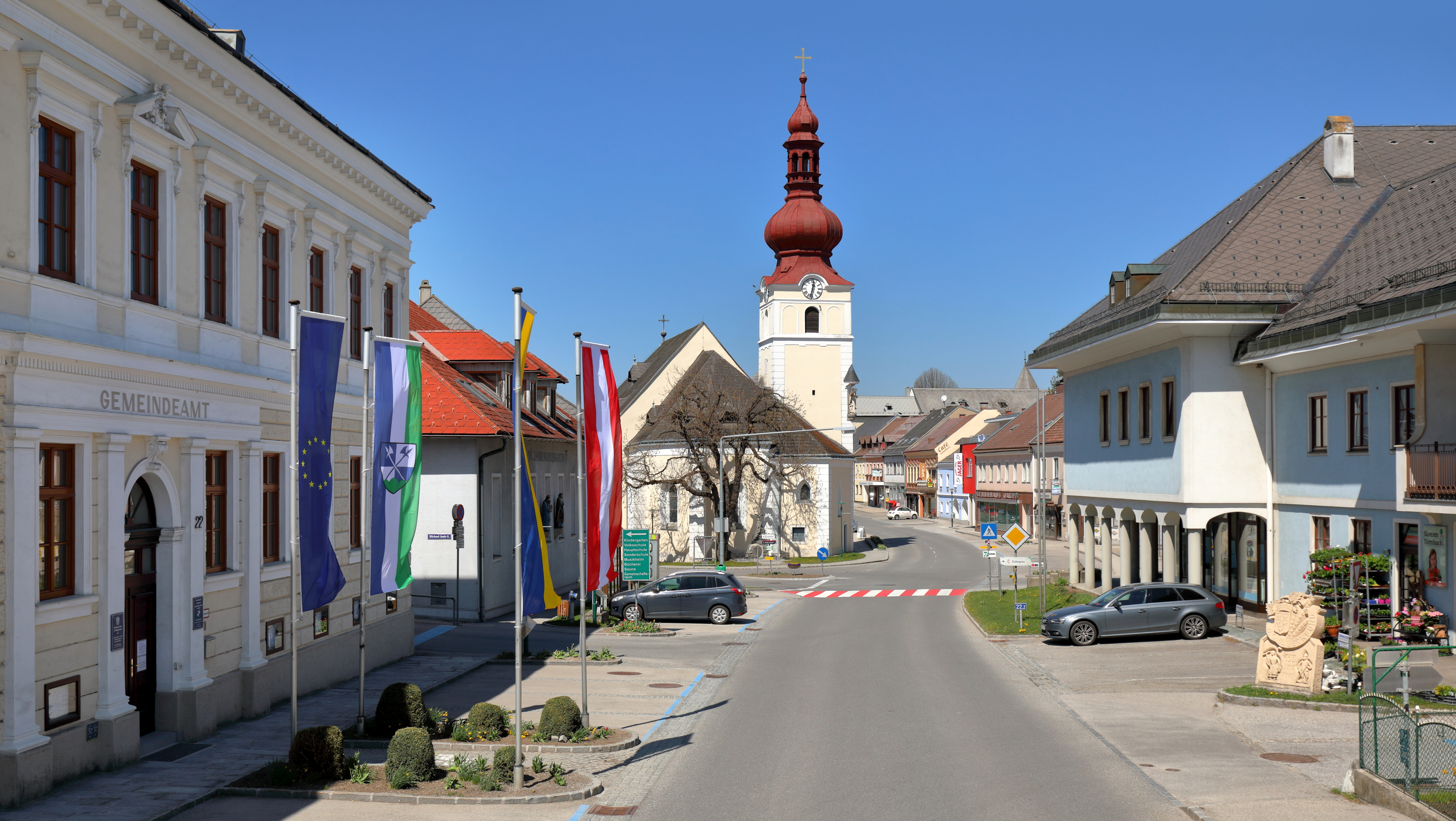 Ortszentrum der niederösterreichischen Marktgemeinde Ottenschlag mit dem Gemeindeamt links und der röm.-kath. Pfarrkirche hl. Jakobus der Ältere im Bildzentrum.